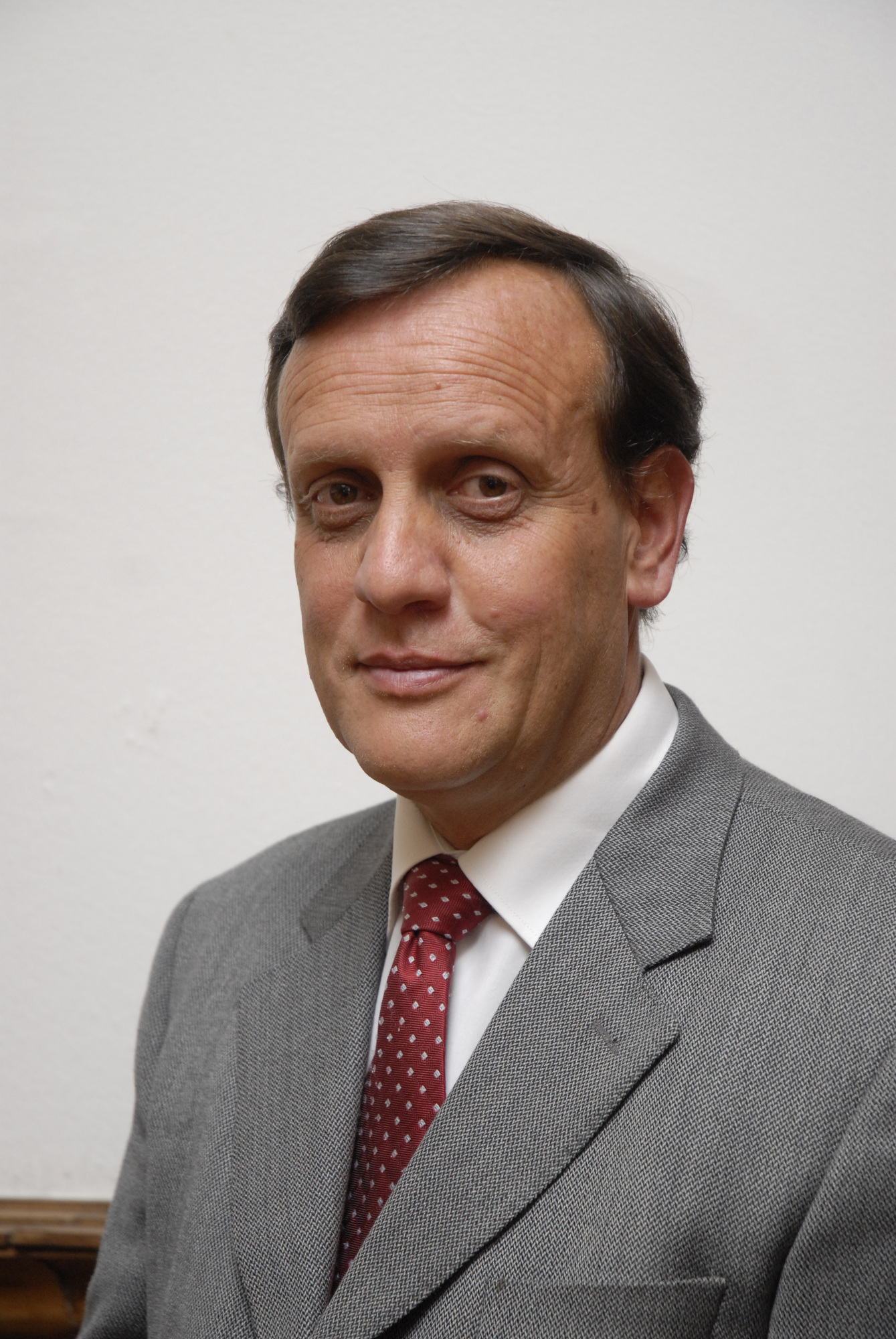 El decano de Medicina es el nuevo rector de la Pontificia Universidad Católica de Chile. Ignacio Sánchez asume en marzo de 2010, por un período de cinco años.